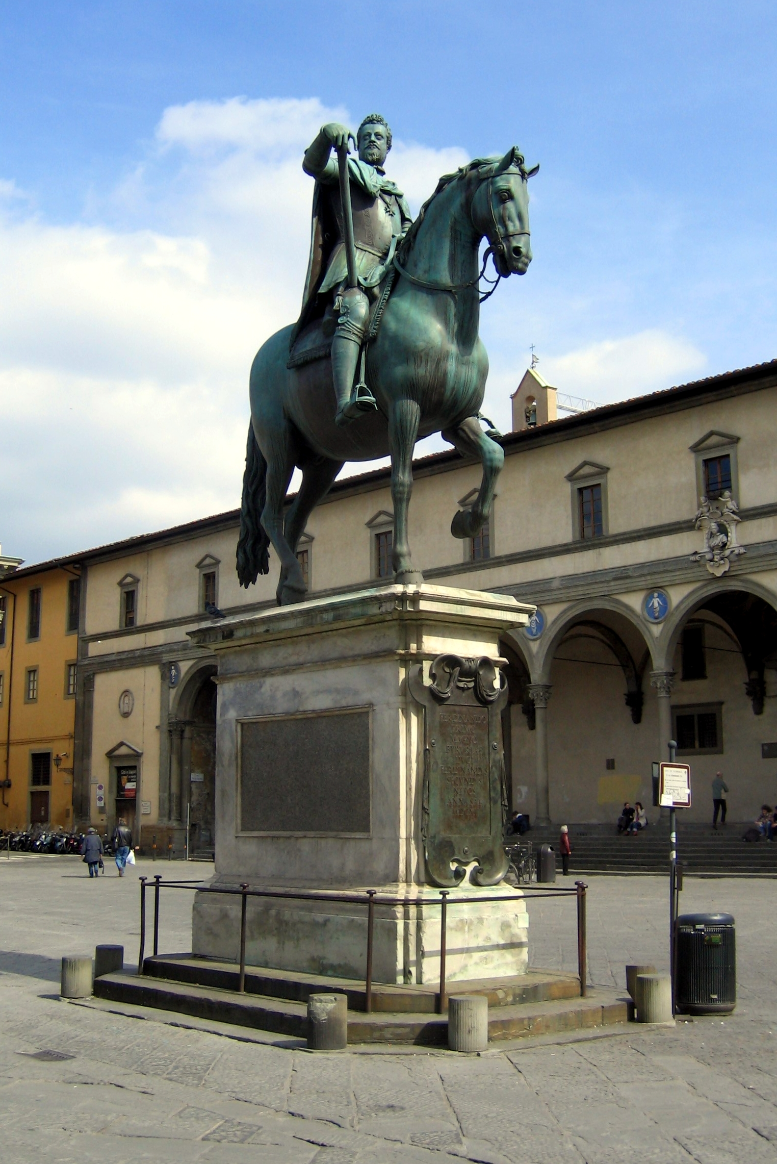 Equestrian statue of Ferdinando I de' Medici on the "Piazza Santissima Annunziata" in Florence. Photographer: Richardfabi.